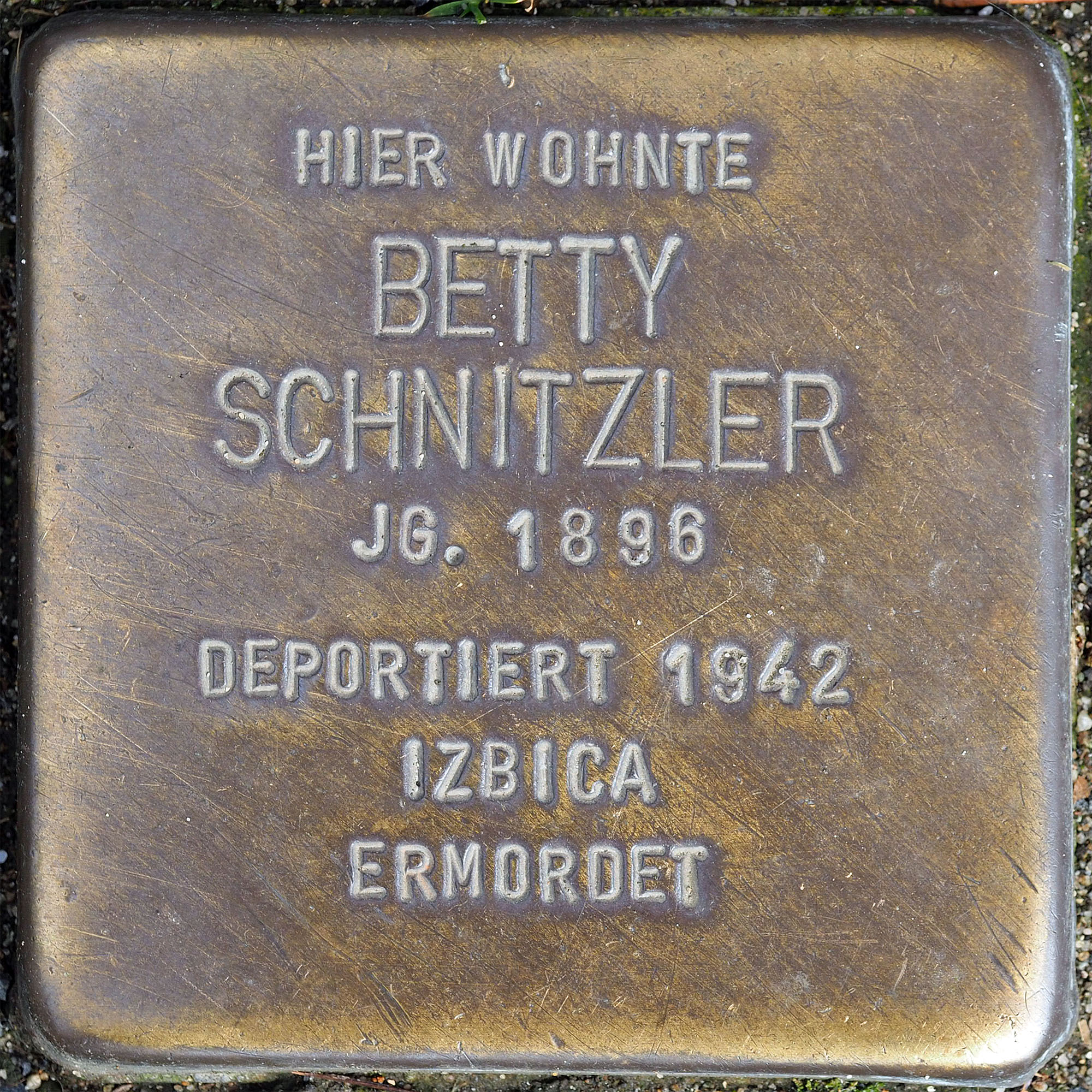 Stolpersteine MG: Schnitzler, Betty